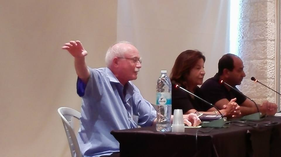 יוחנן בן יעקב בפאנל עם ג. יפית ורמי לוי